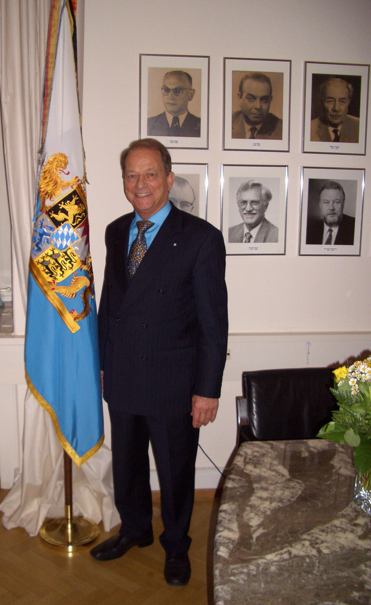 Prof. Dr. Peter Paul Gantzer